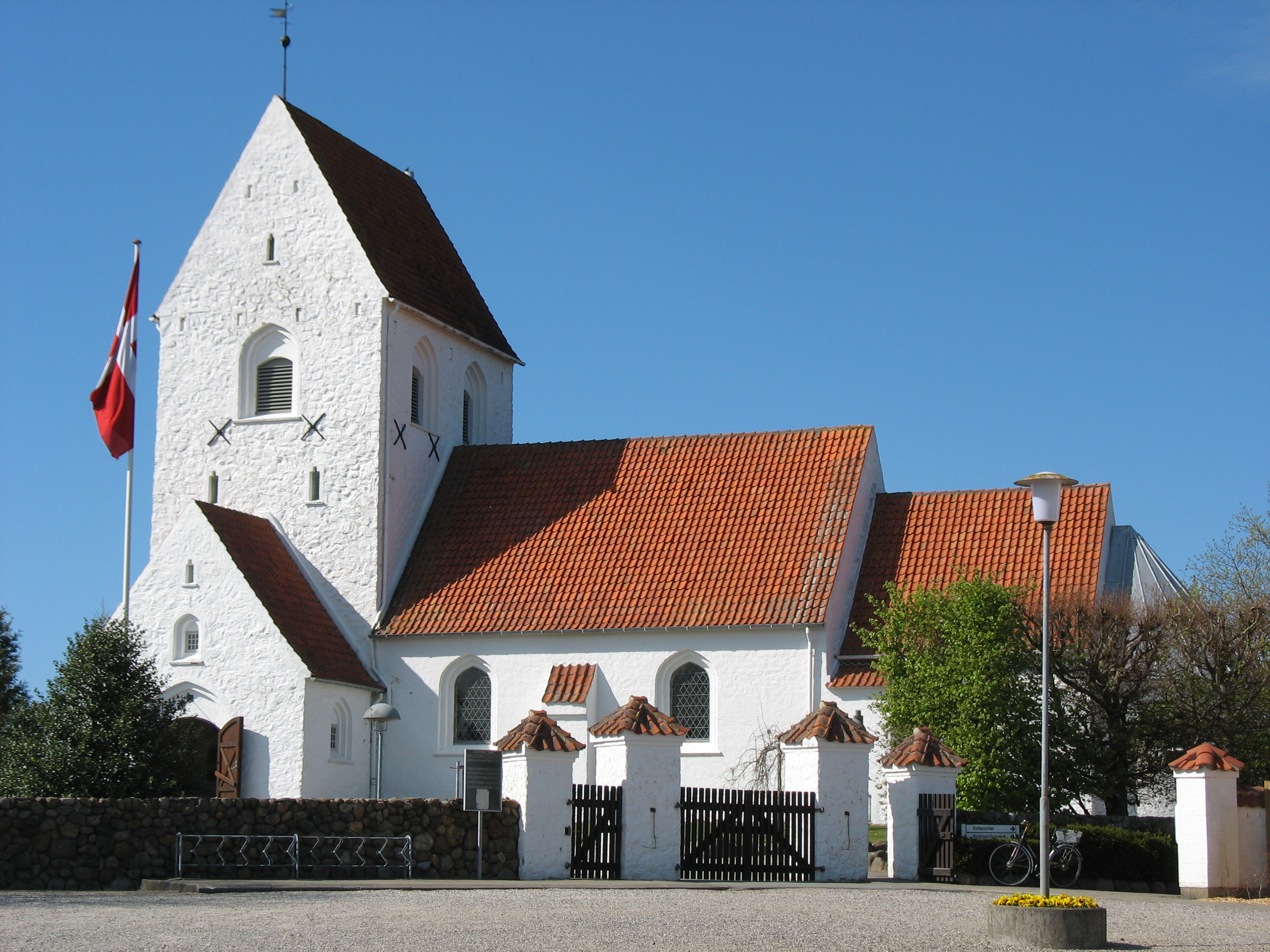 Bjerring Church, Viborg Kommune, Denmark